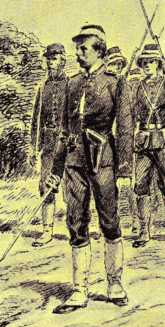 Joost Romswinckel